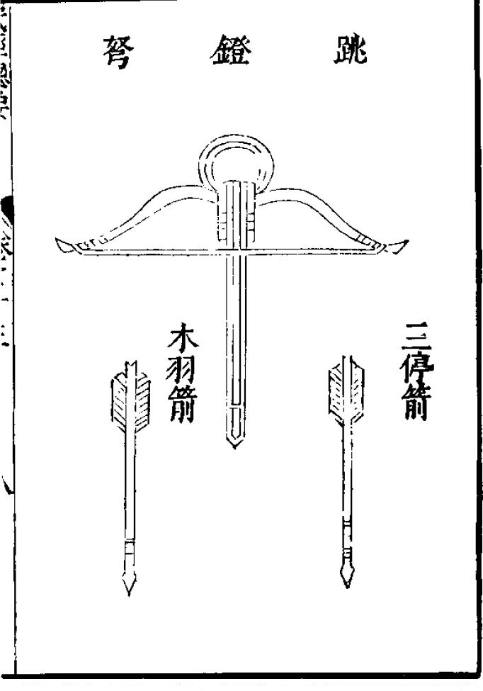 《武经总要》之跳蹬弩图